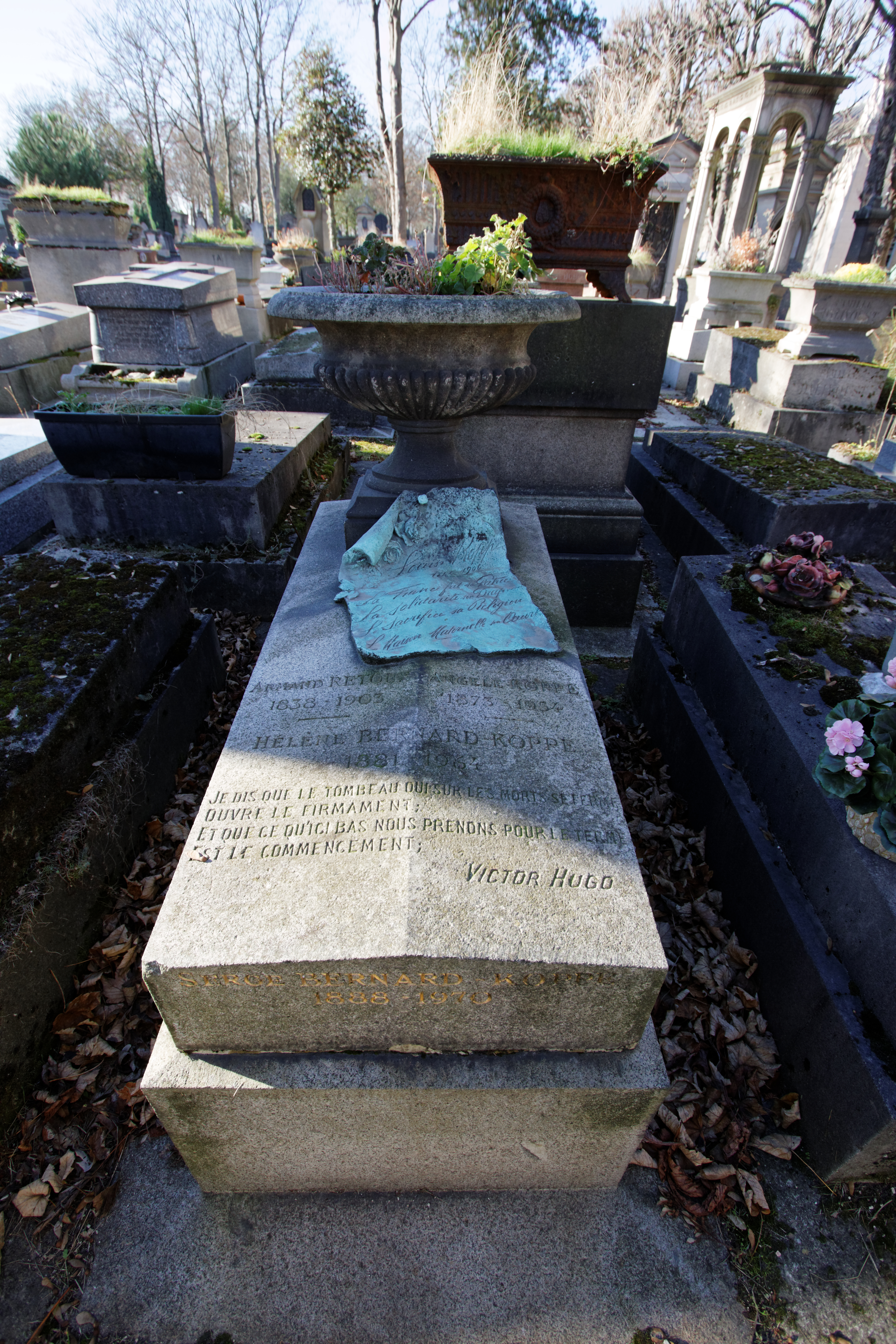 Sépulture de Louis Koppe (1846-1900), fondatrice de La Maison Maternelle ; Angèle Koppe (1873-1934), directrice de La Maison Maternelle et fille de Louise Koppe. La tombe comporte un extrait du poème À Villequier de Victor Hugo.